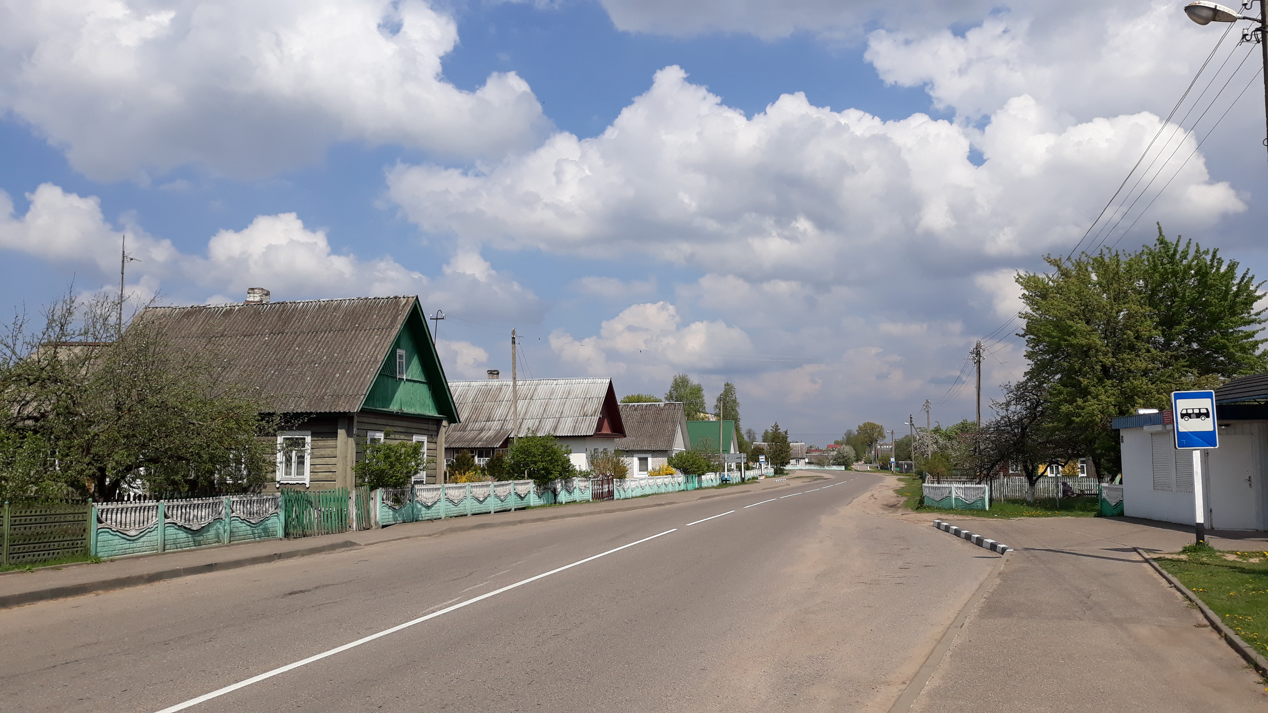 Камсамольская вуліца